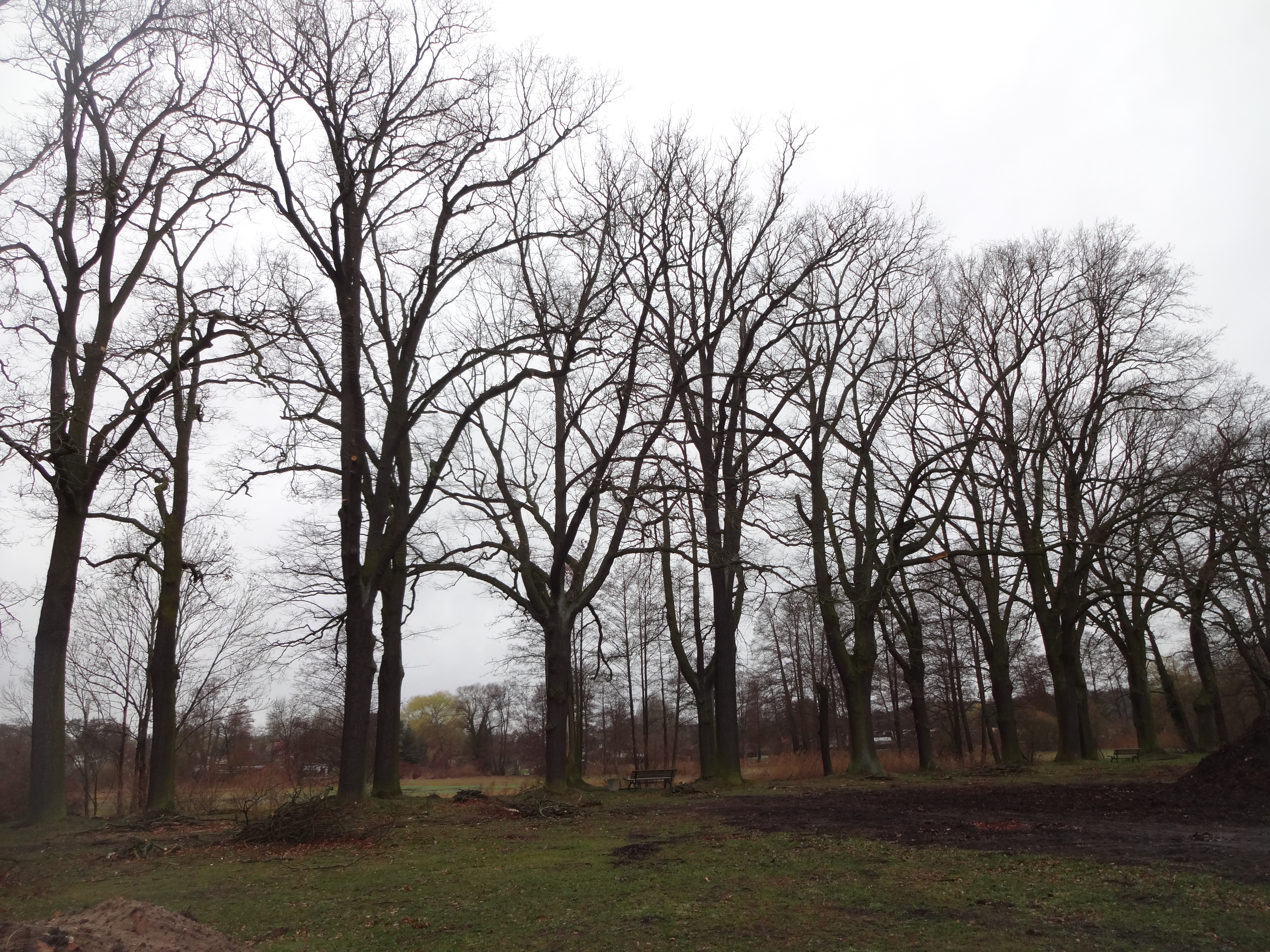 als Naturdenkmal geschützte Gruppe von Stieleichen auf dem Gelände des Kloster Lehnin